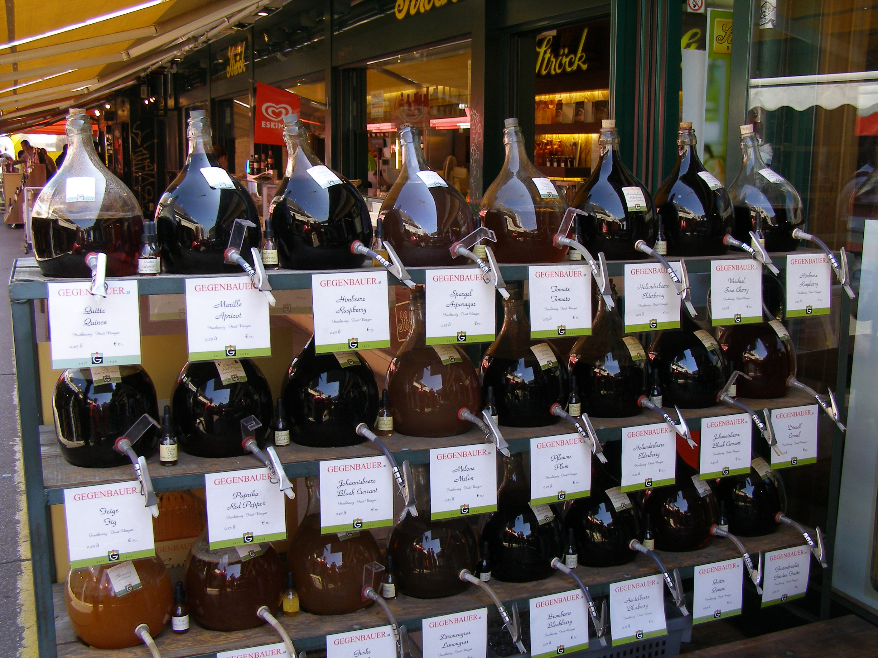 Wiener Naschmarkt, Verkauf von Essig